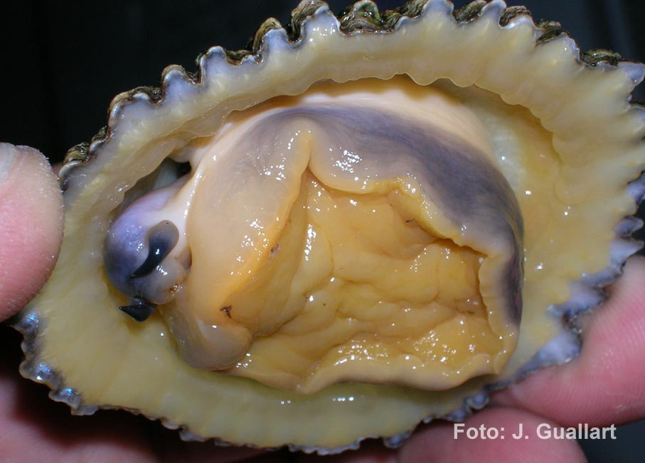 Ejemplar adulto de Patella ferruginea, visto ventralmente